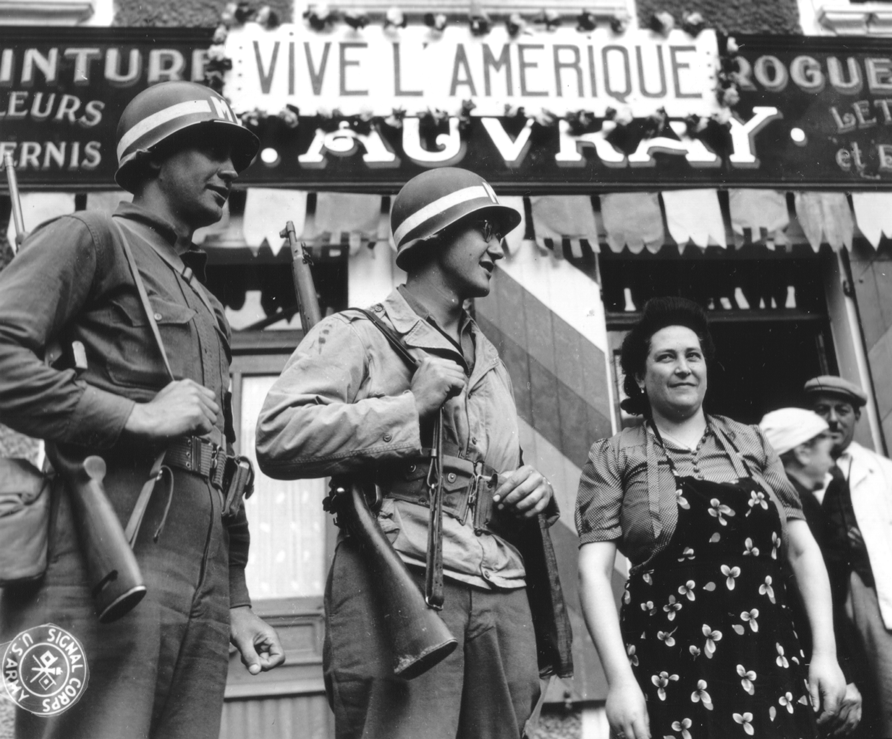 deux US MP's se tiennent avec une femme sous l'enseigne de la Peinture-Droguerie A. AUVRAY qui affiche une pancarte "Vive l'Amérique". Rue de Balleroy (GC 10 aujourd'hui la D 10) au Molay-Littry.